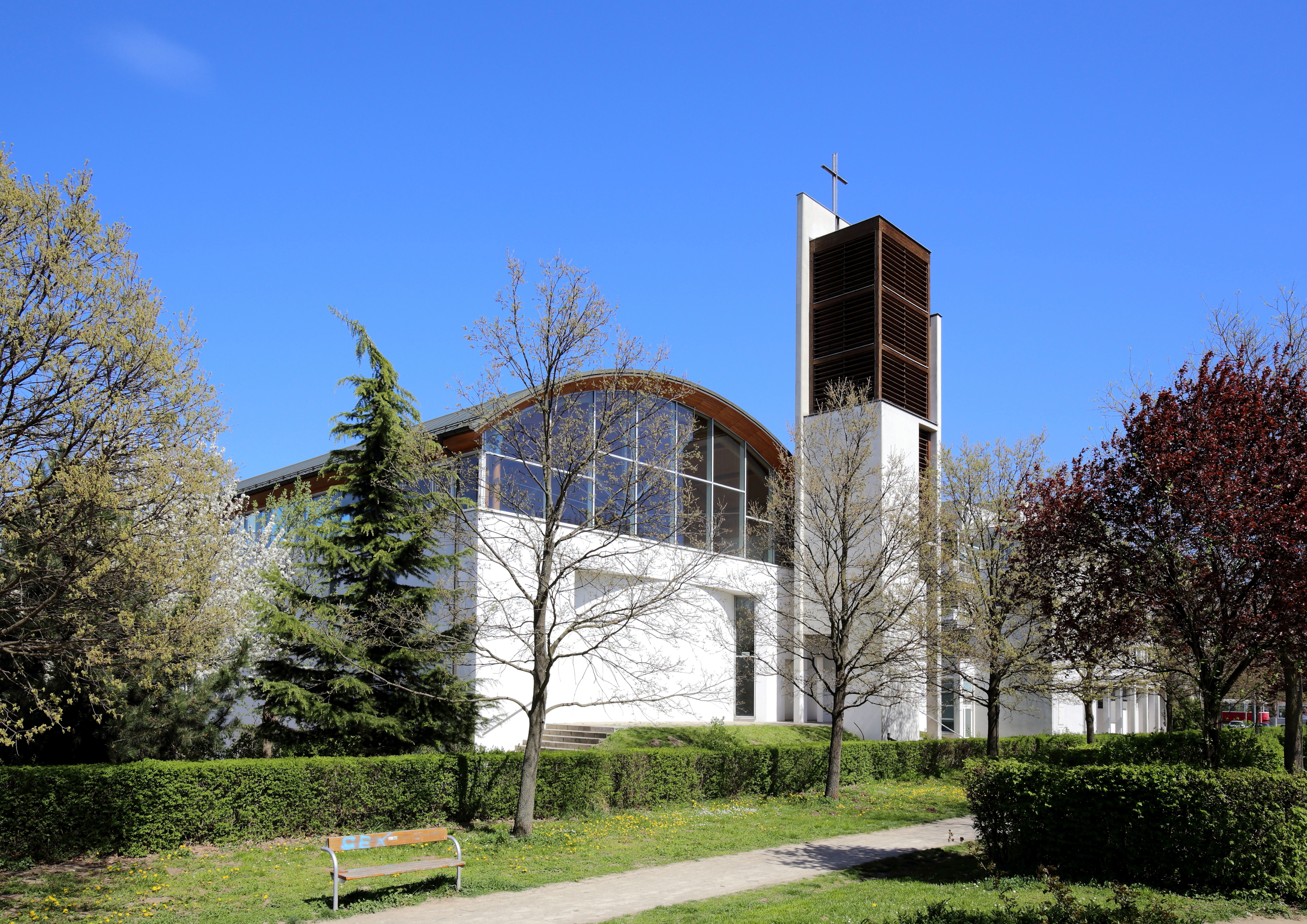 Die von 1994 bis 1995 errichtete Pfarrkirche Cyrill und Method in Stammersdorf, ein Ortsteil im 21. Wiener Gemeindebezirk Floridsdorf.